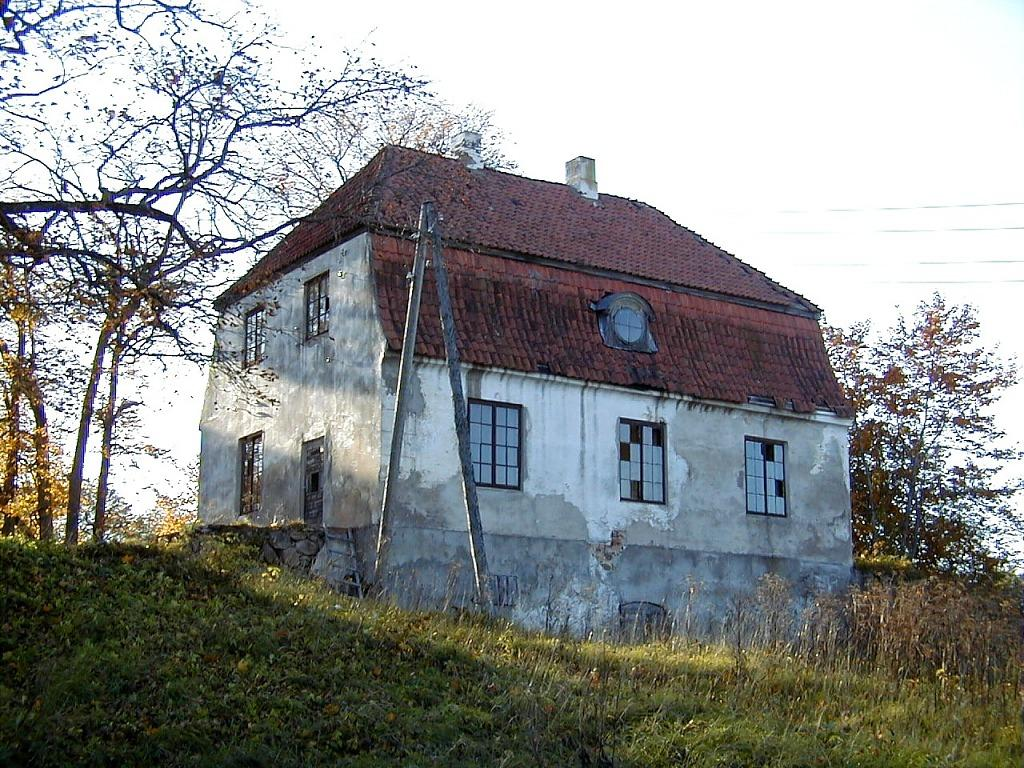 Vainižu muižas pils 2000-10-01